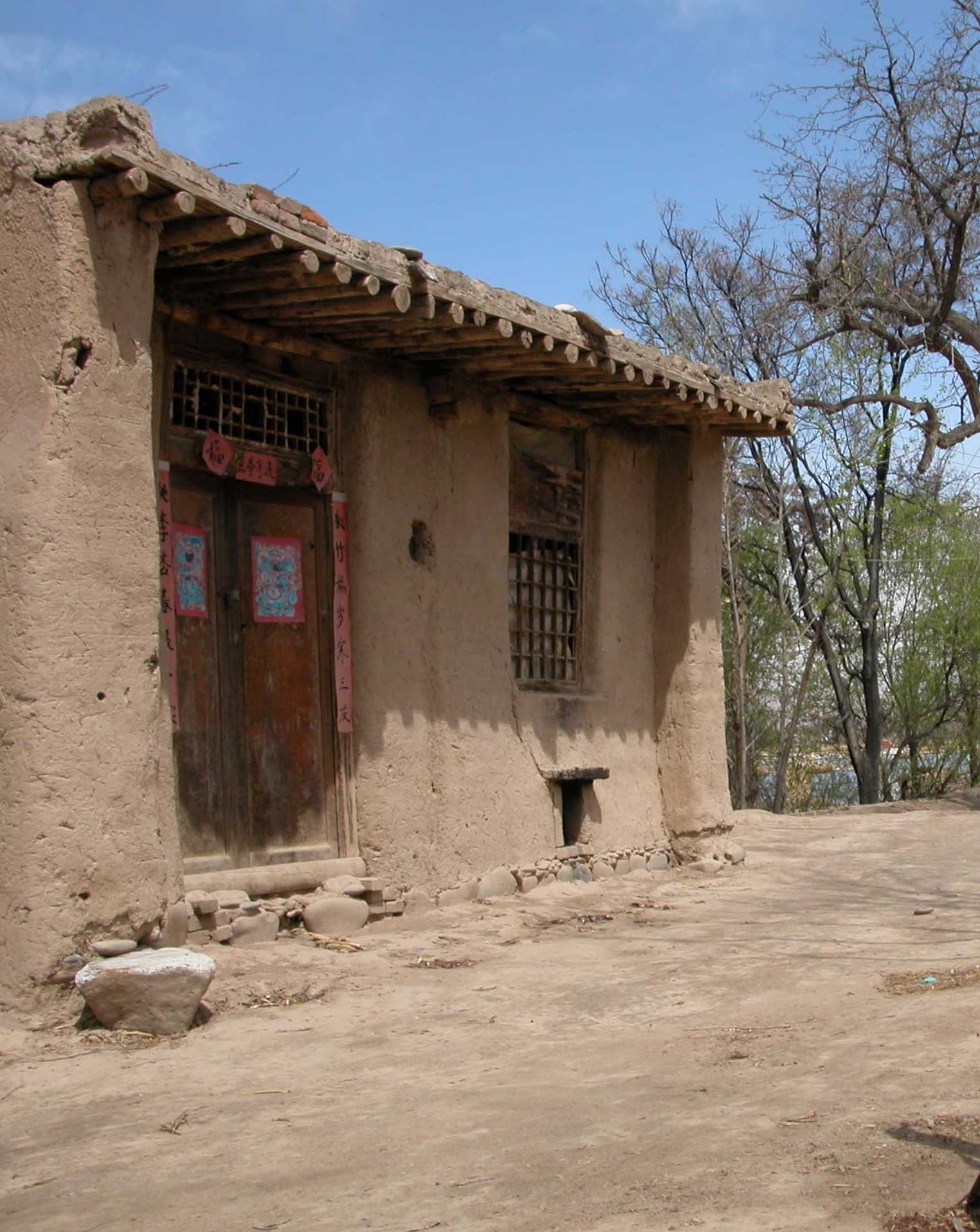 农民的房子